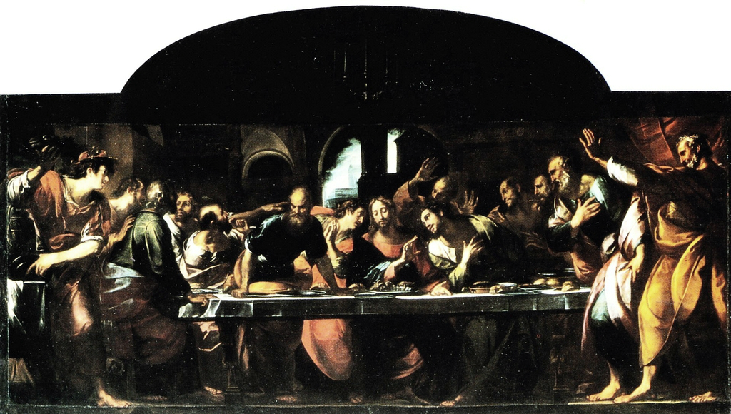 Ultima Cena